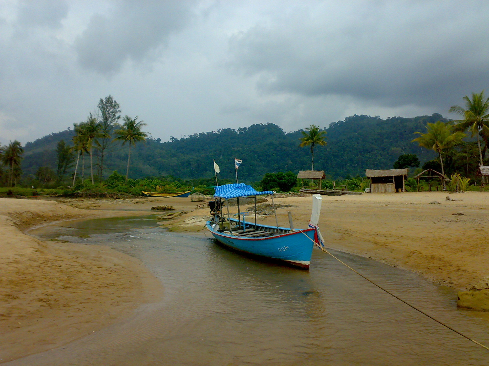 Fishing boats at Bang Niang, Khao Lak, Takua Pa, Phang-Nga, Thailand